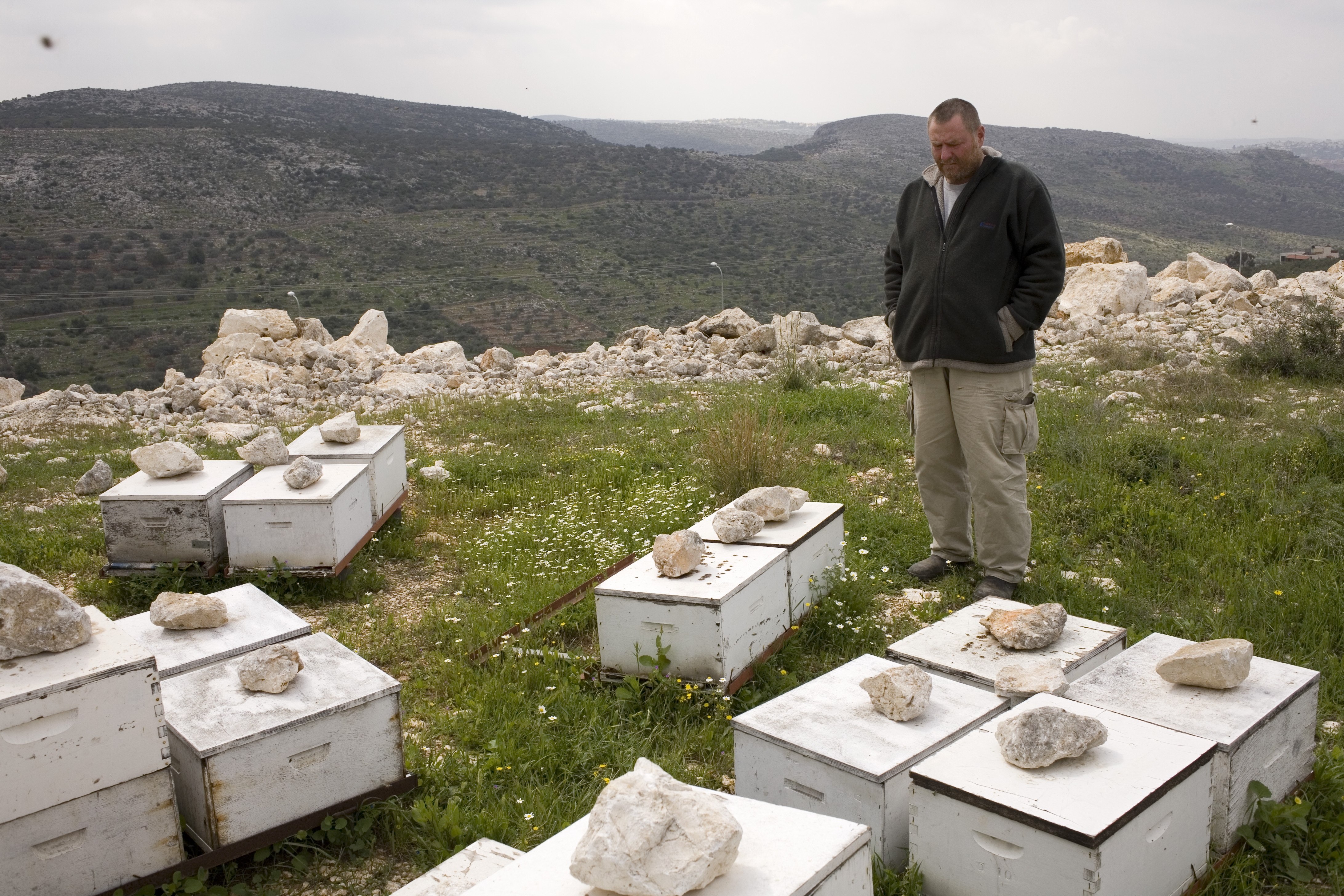 he:משק דבורים סימון